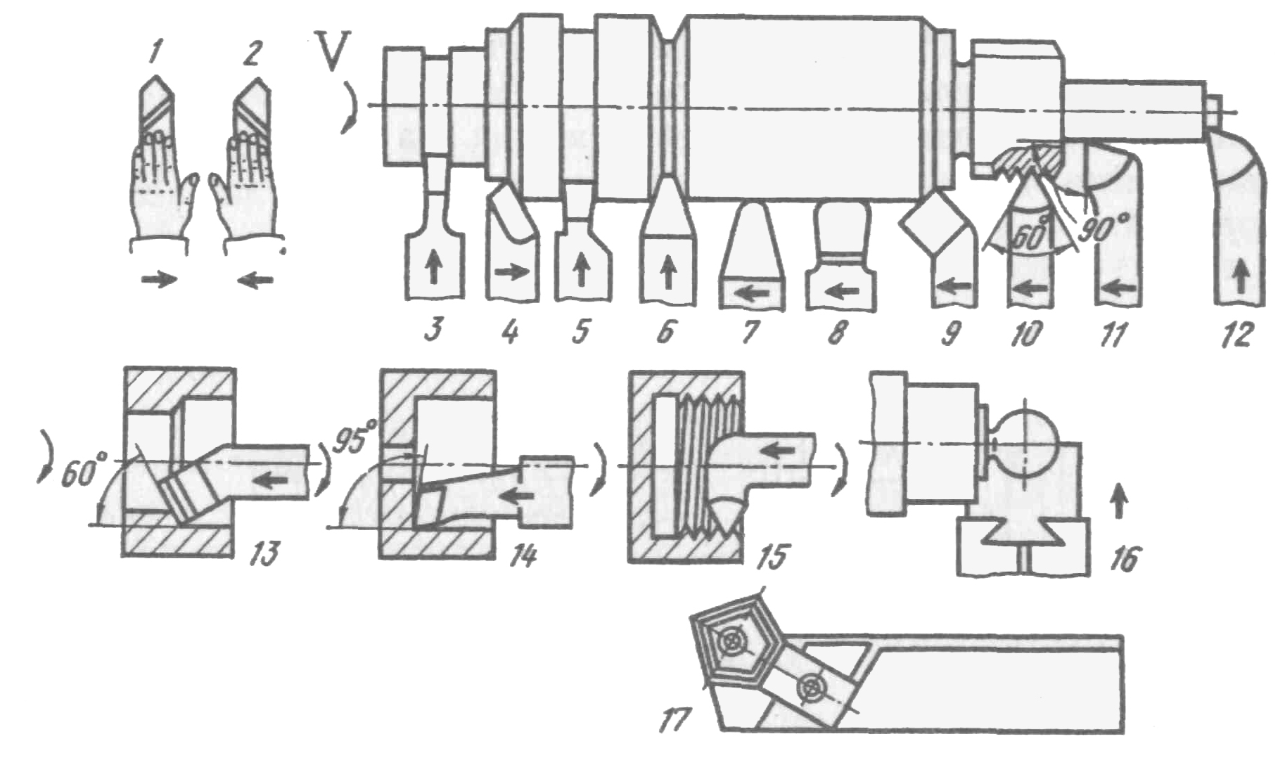 Види токарних різців: Види токарних різців